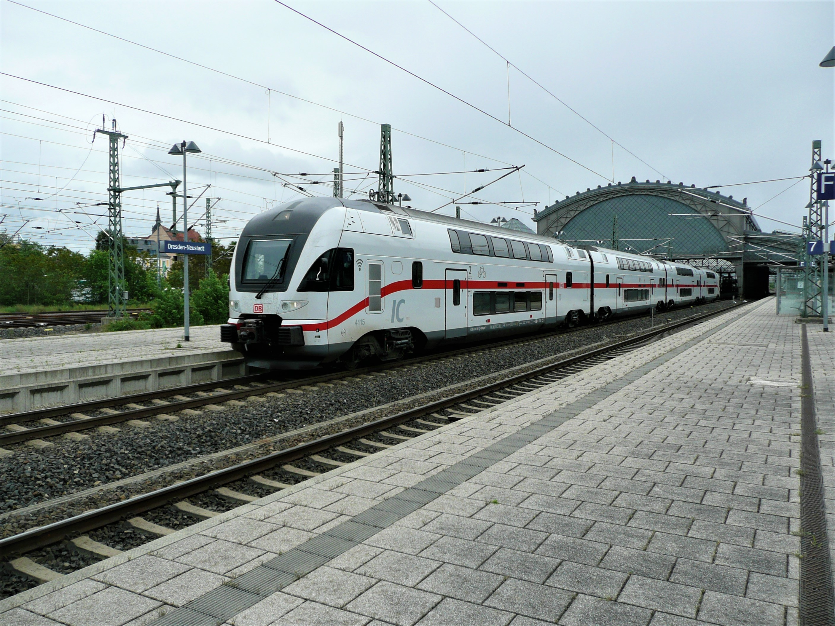 Stadler KISS2 Nr. 4115 vor IC nach Warnemünde in Dresden-Neustadt